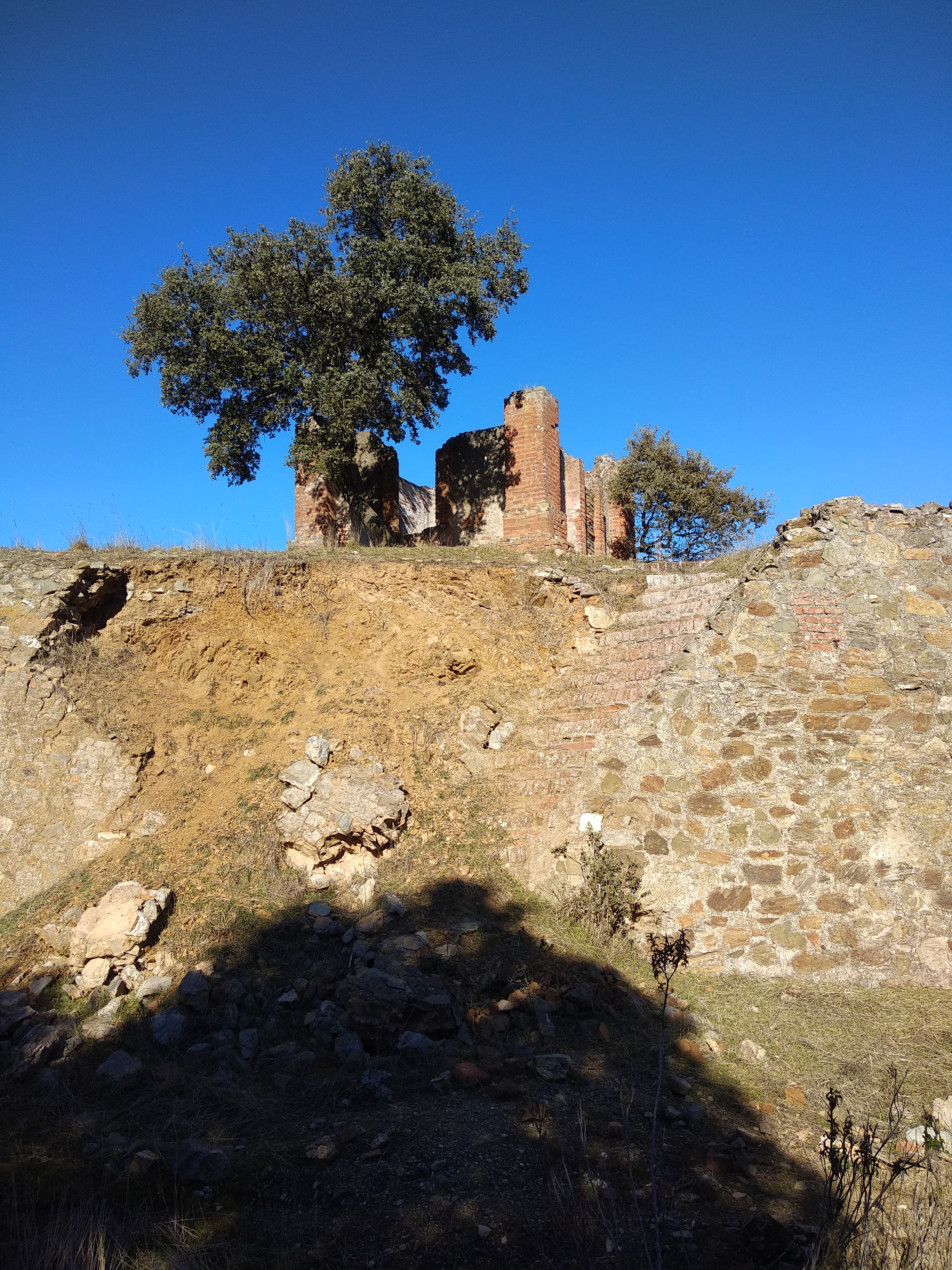 Antiguo cargadero de mineral junto a la estación de la Coronada-Argallón (Córdoba, España)